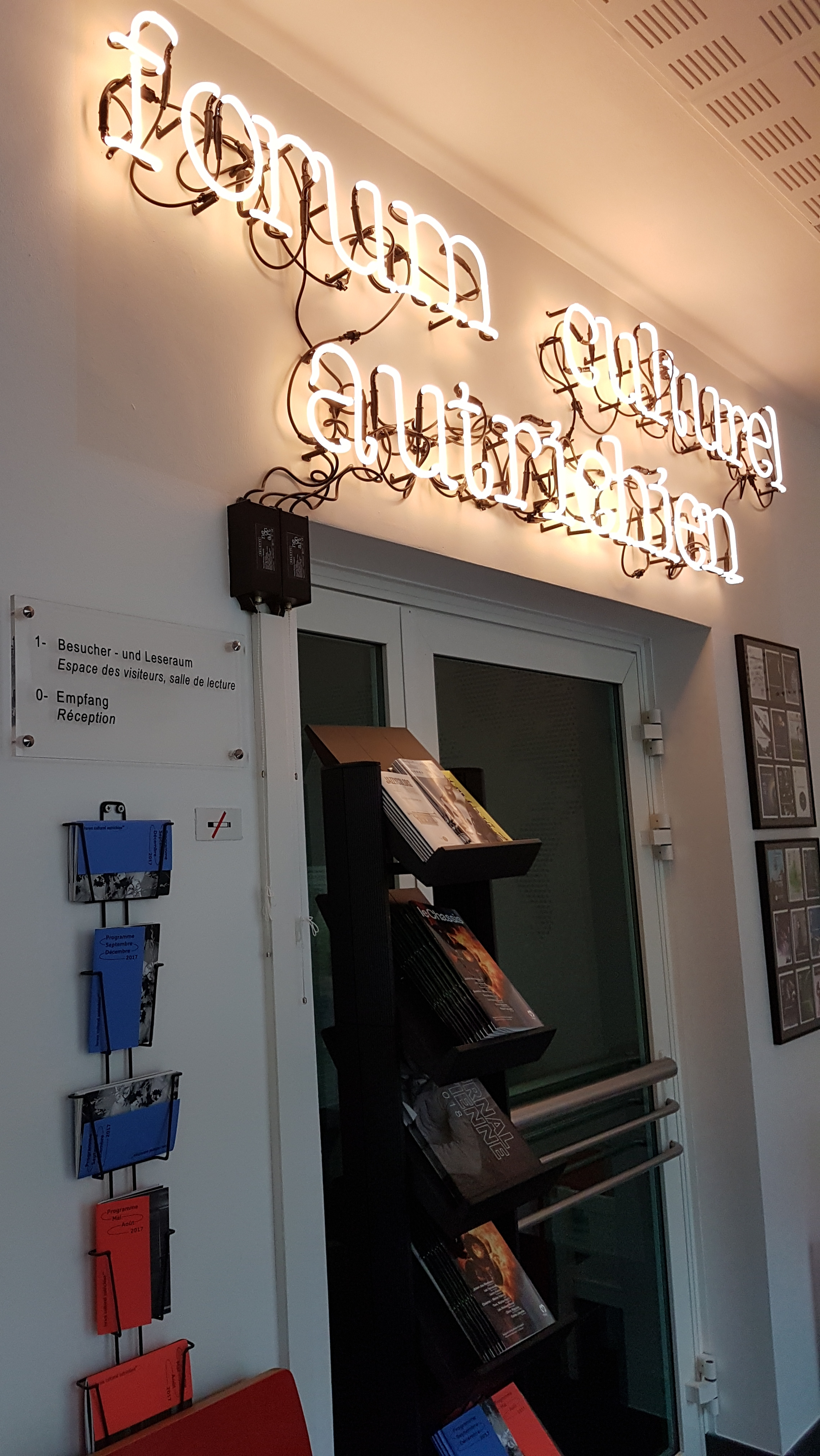 Eingang des ÖKF